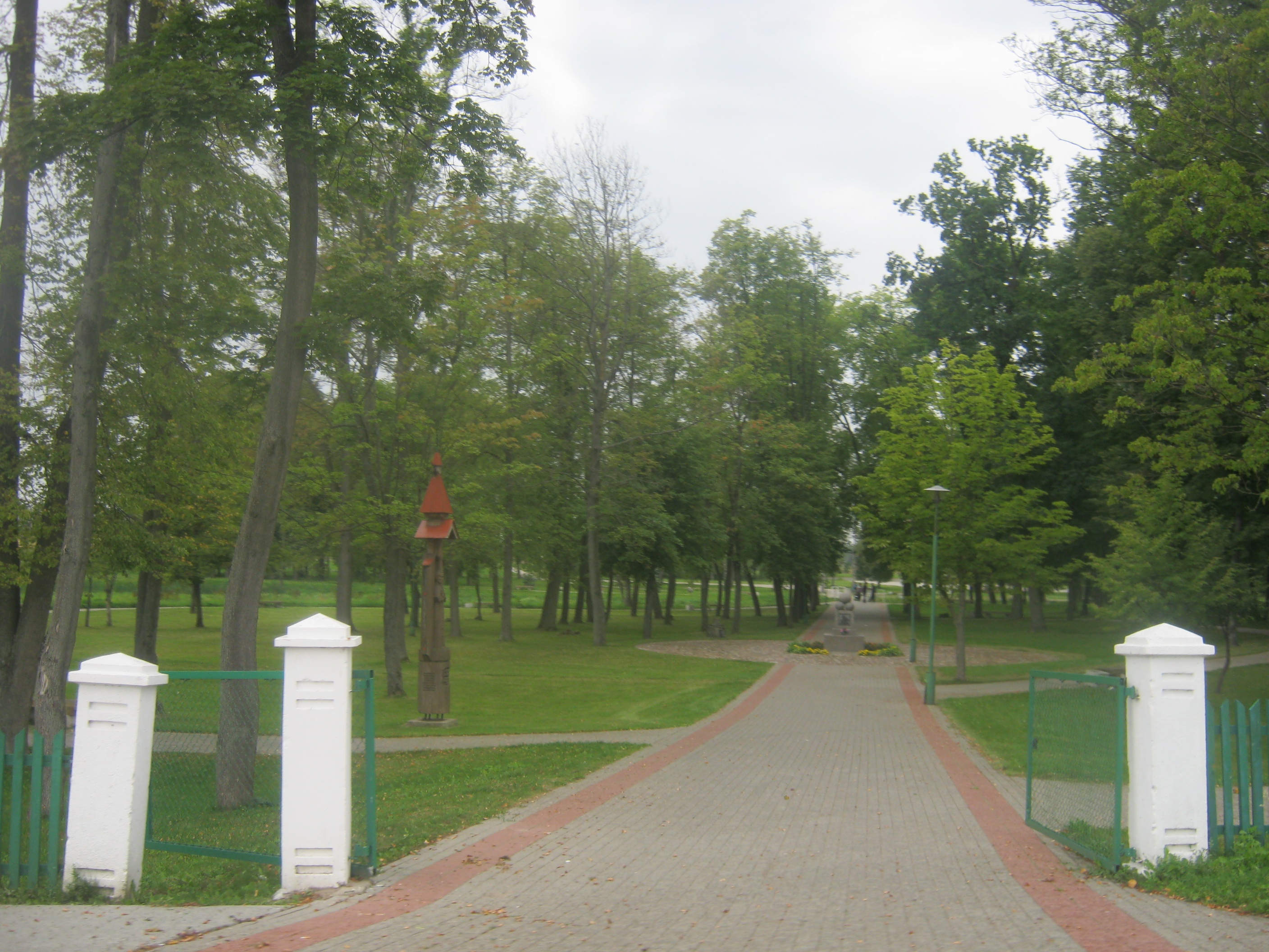 Kalvarija